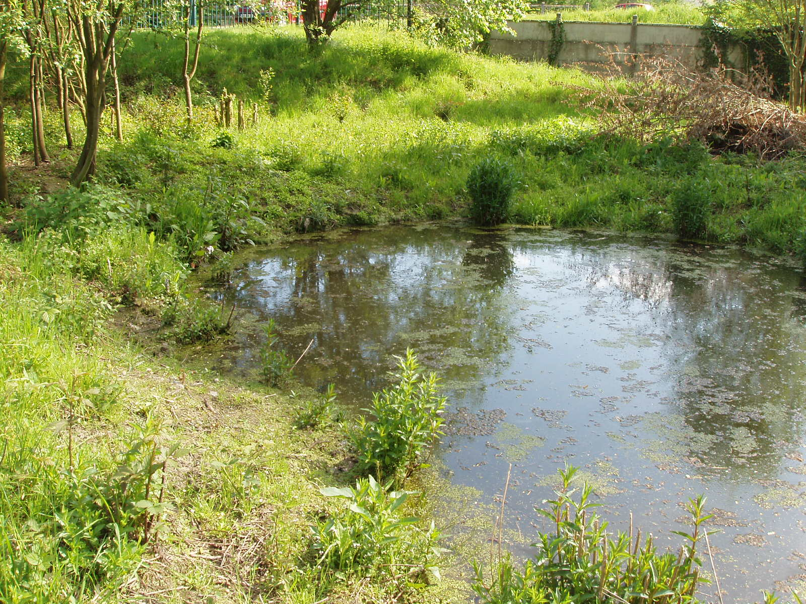 Mare restaurée par l'association Vitré Tuvalu